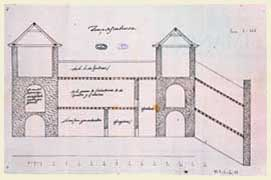 Plano del Archivo de Simancas realizado en el siglo XVI, y que hoy se conserva en el propio archivo. Las anotaciones están hechas a mano por Diego de Ayala.